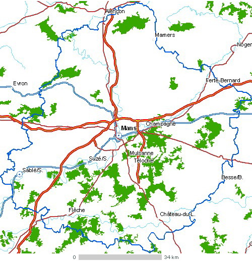 Carte du département Sarthe Légende